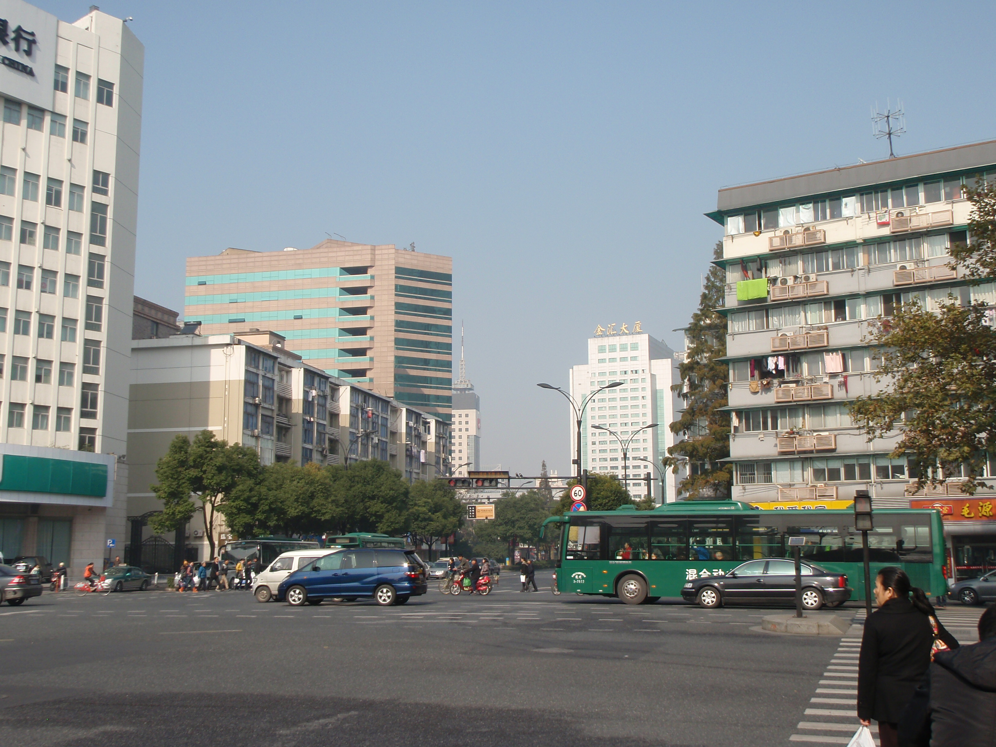 体育场路与环城西路交叉口